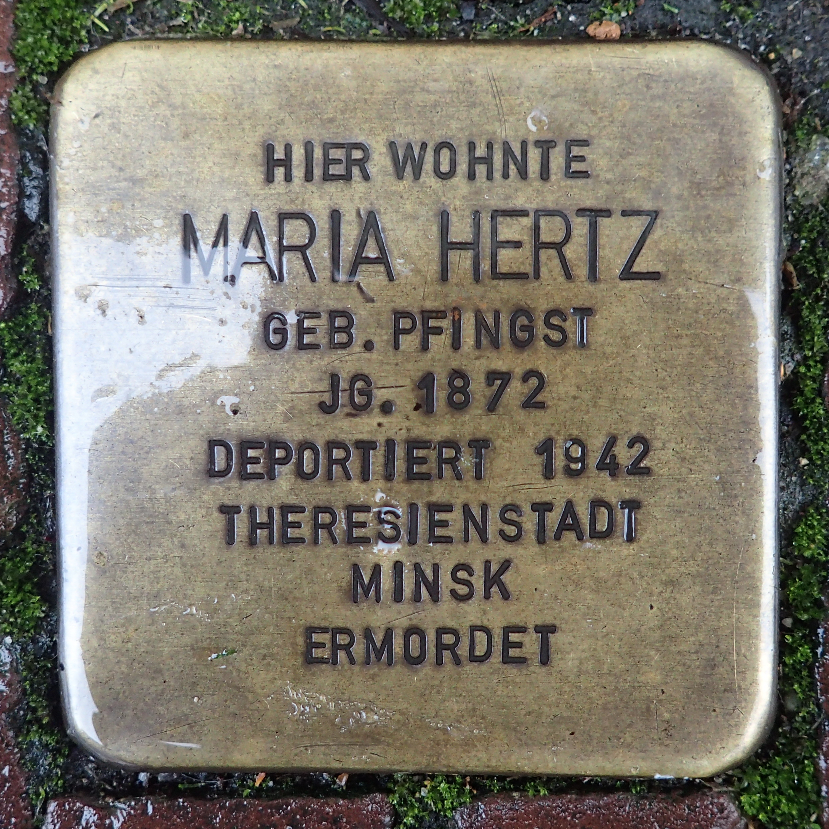 Stolperstein Geldern Issumer Straße 64 Maria Hertz